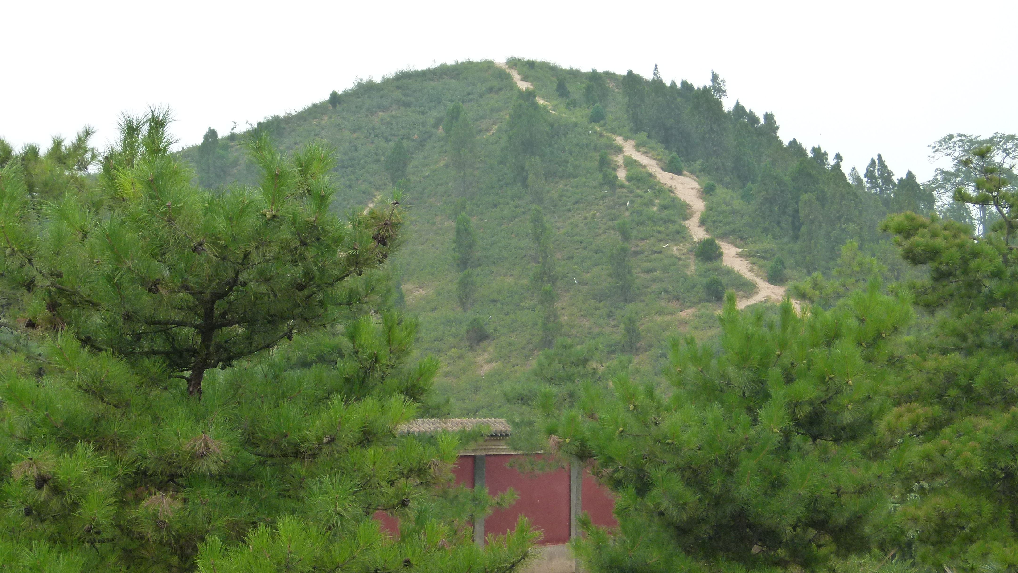 Grab des Generals Wei Qing innerhalb des Mausoleums Maoling, China (衛青墓)